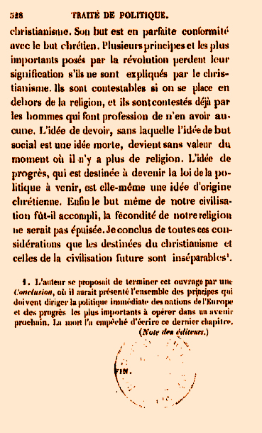 Dernières lignes du "Traité de politique et de science sociale"